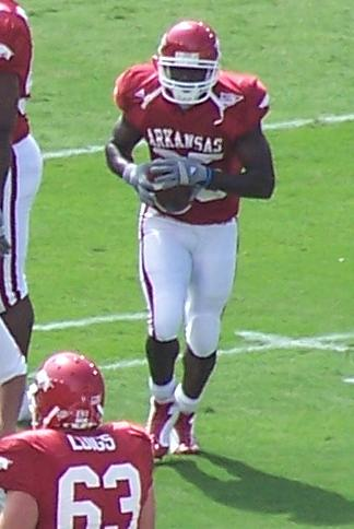 Felix Jones at Arkansas in 2006.